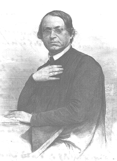 The image of German author Beda Weber (1798-1858) deutscher Schriftsteller und Benediktinerpater Beda Weber (1798-1858)